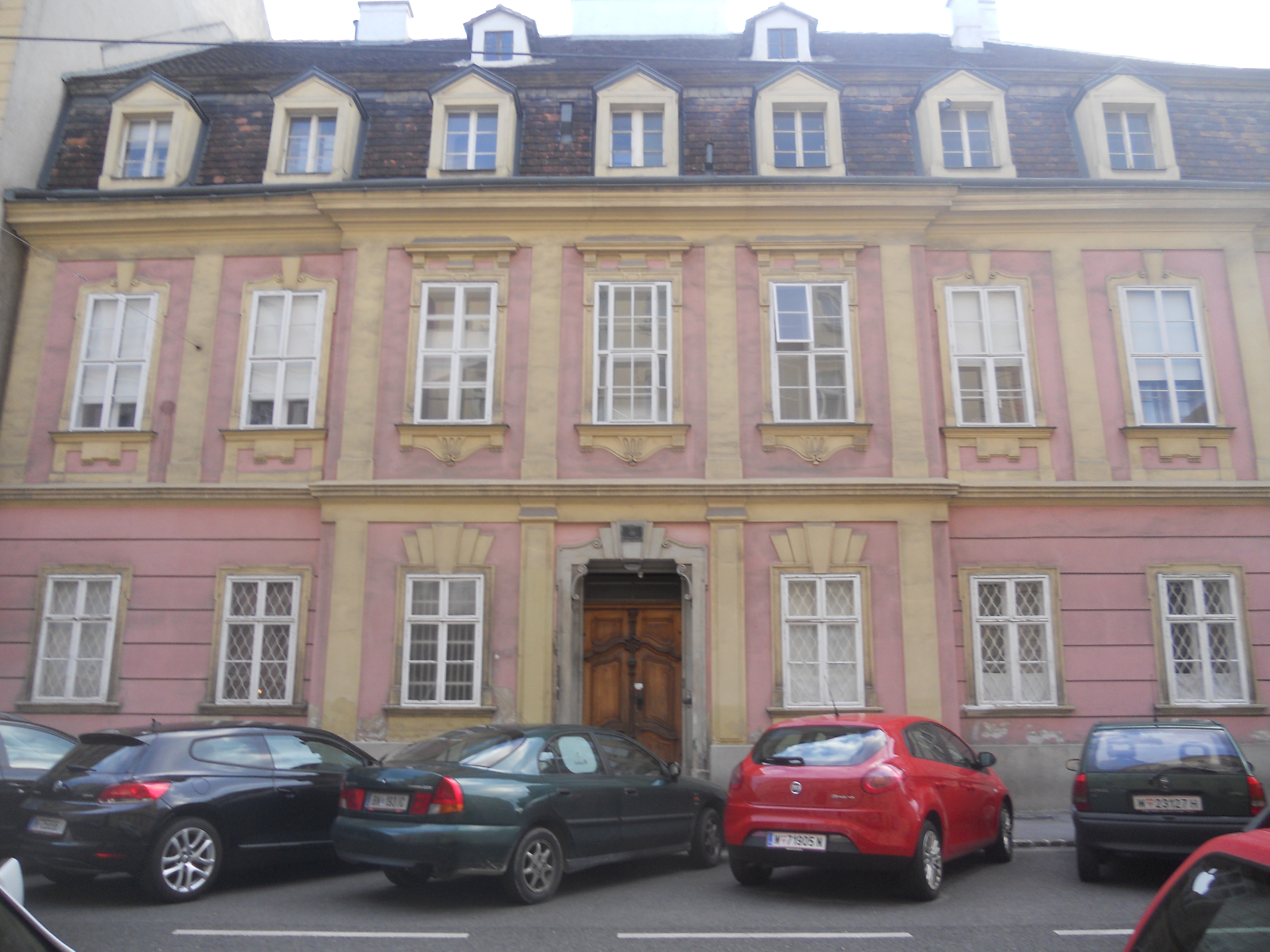 Haus Barmherzigengasse 8 in Wien